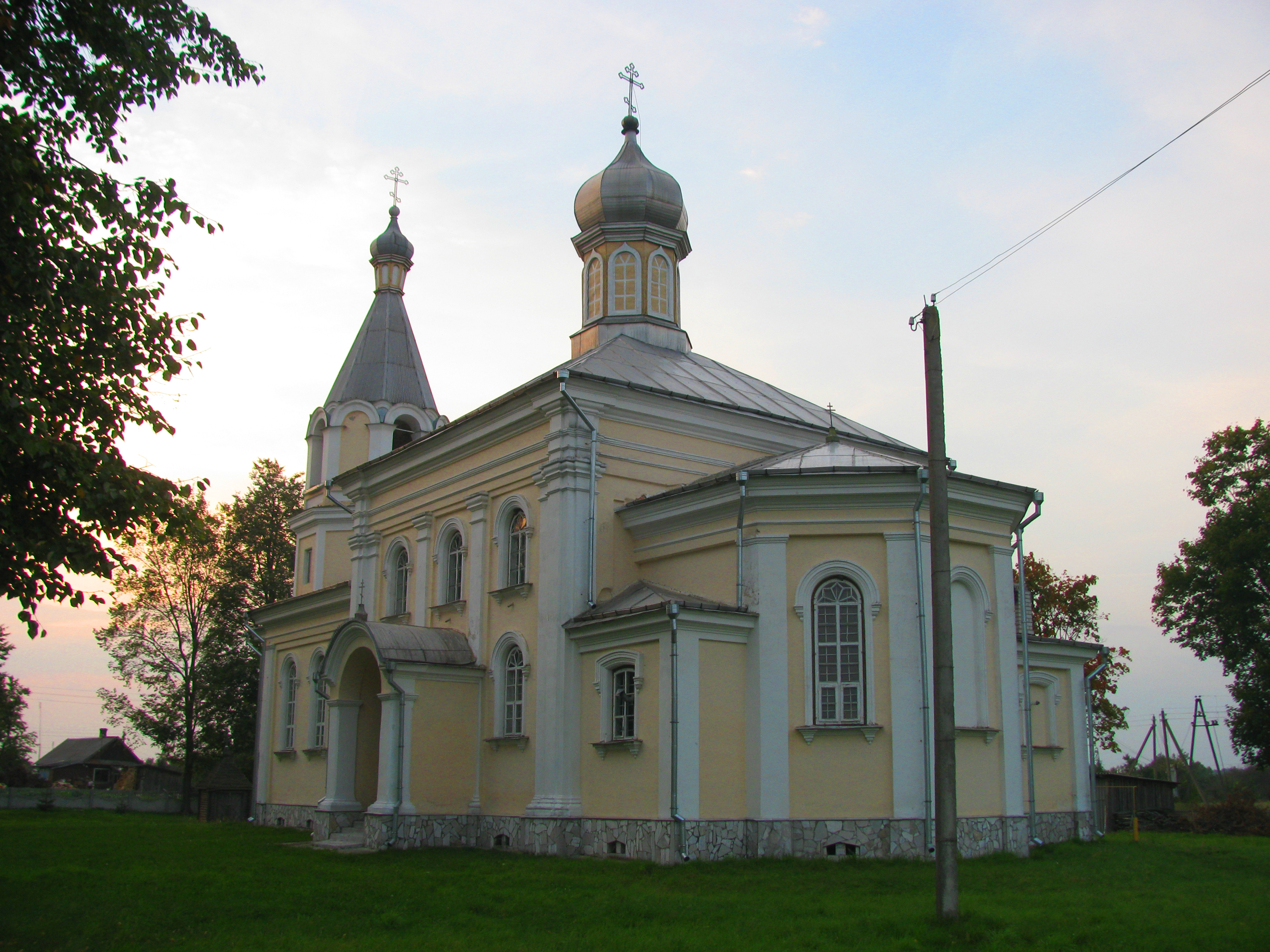 Беларуская (тарашкевіца): Усьпенская царква. в. Сялец This is a photo of Belarusian heritage monument. Reference number: 113Г000156 ( WLM)